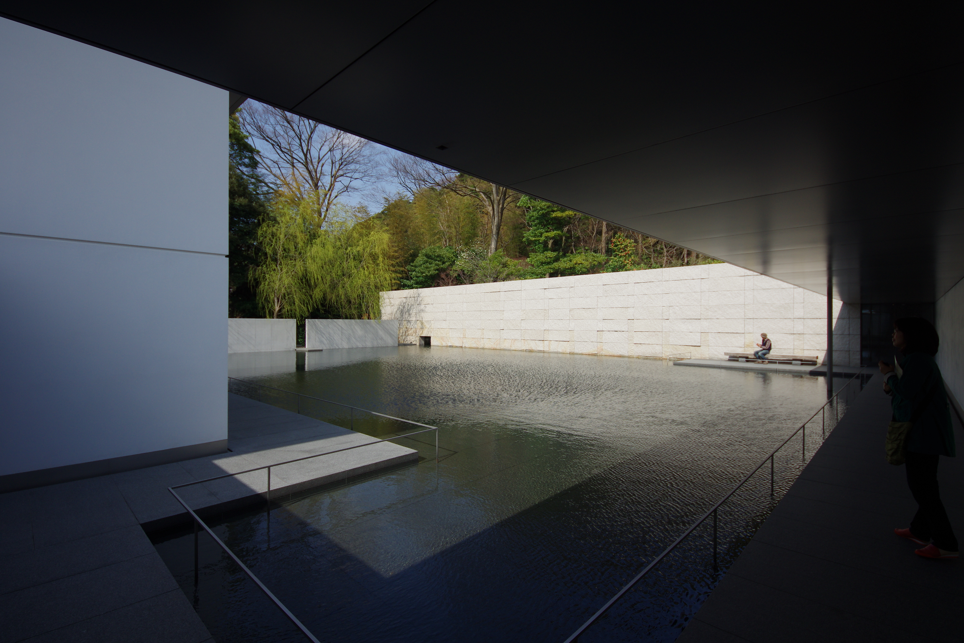 石川県金沢市、鈴木大拙館外部回廊。谷口吉生設計